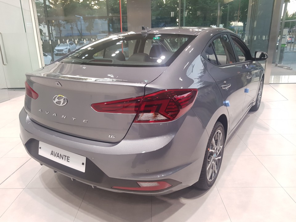 현대 더 뉴 아반떼 후측면